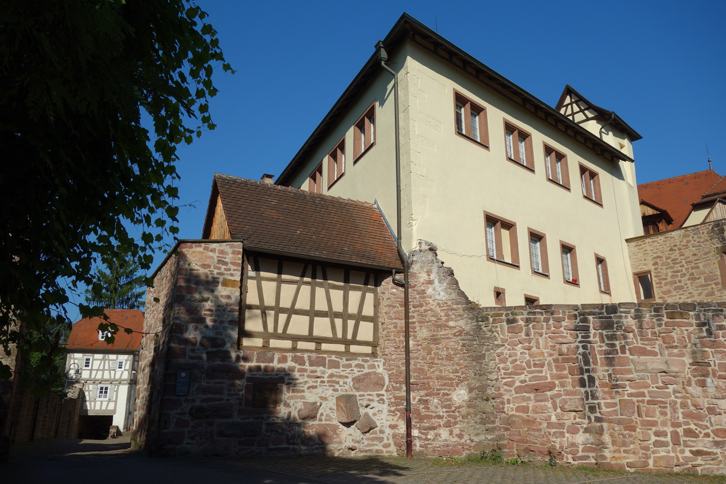 Schloss Neuenbürg - Ansicht von Osten